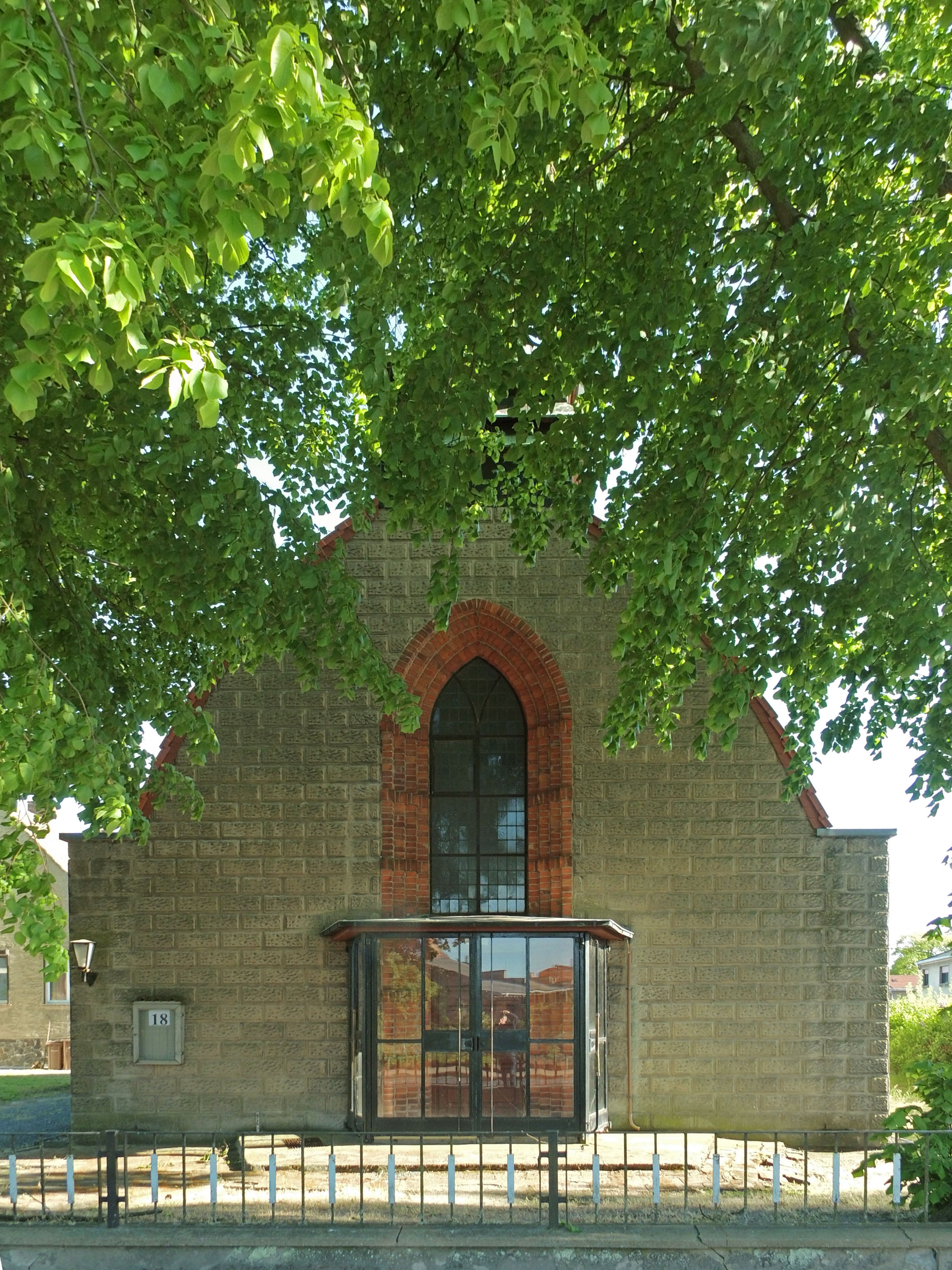 Ehemalige katholische St.-Bernhard-Kirche in Goldbeck (Landkreis Stendal), Ansicht von Norden.